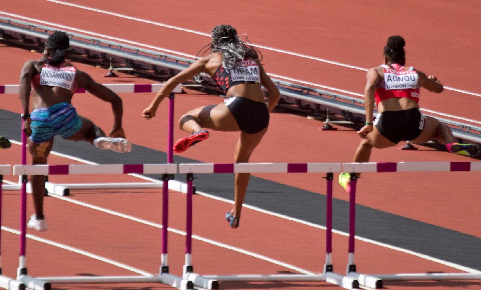 d1_2 thiam 100mh